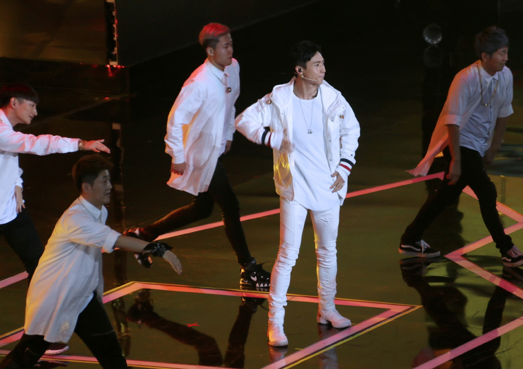 160409 深圳 音乐风云榜 -金大川- -魏晨- 4P